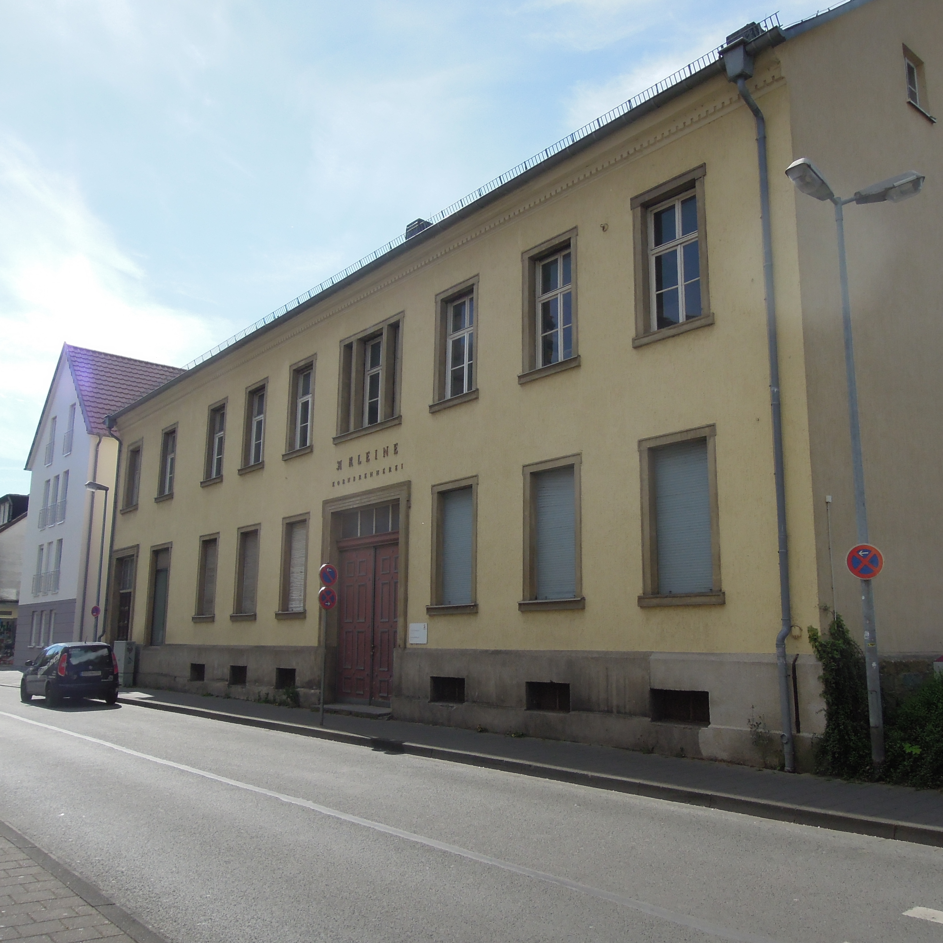 Stolpersteinlage Soest Grandweg 32